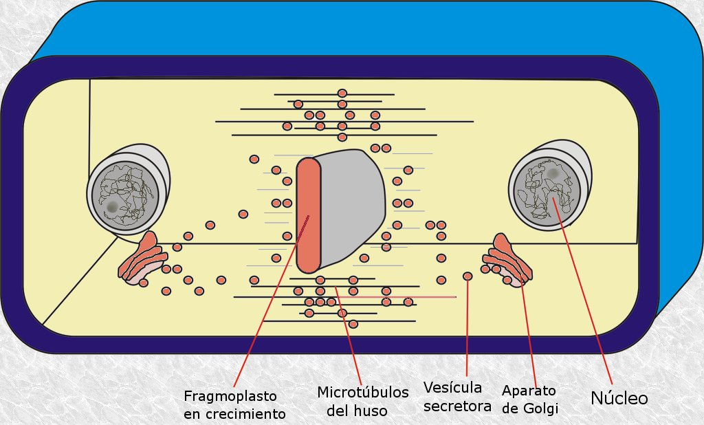 Esquema de la formación del fragmoplasto en las células vegetales